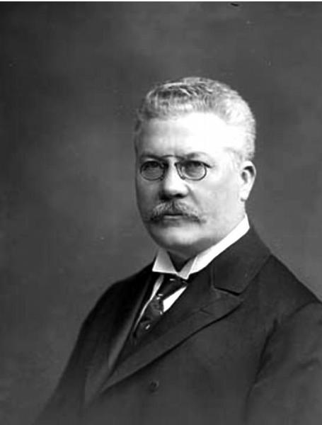 MUDr. Jan Deyl